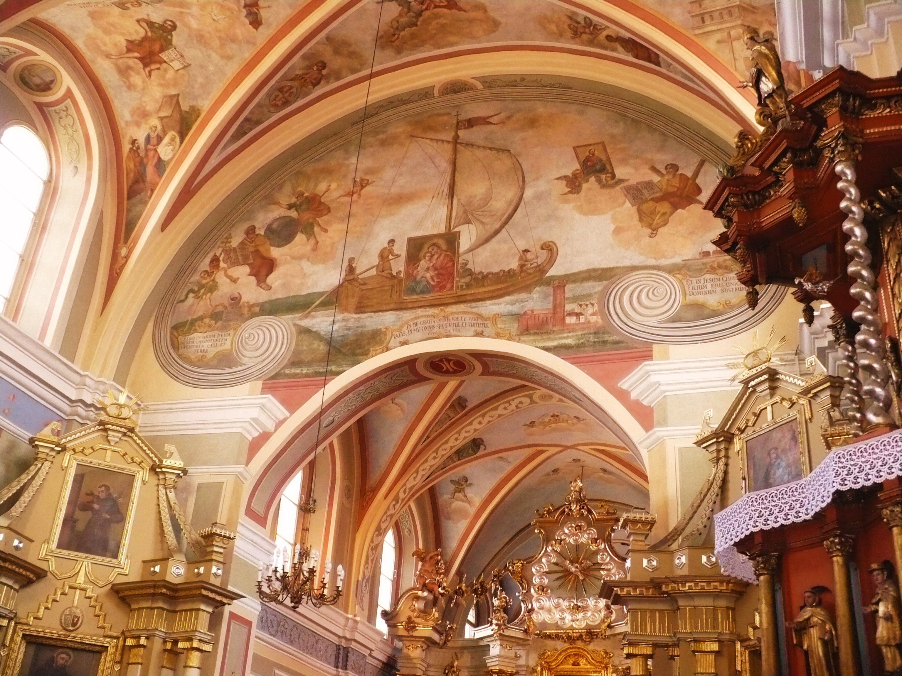 zespół klasztorny bernardynów, XVII-XX: kościół, ob. p.w. Niepokalanego Poczęcia NMP Świecie